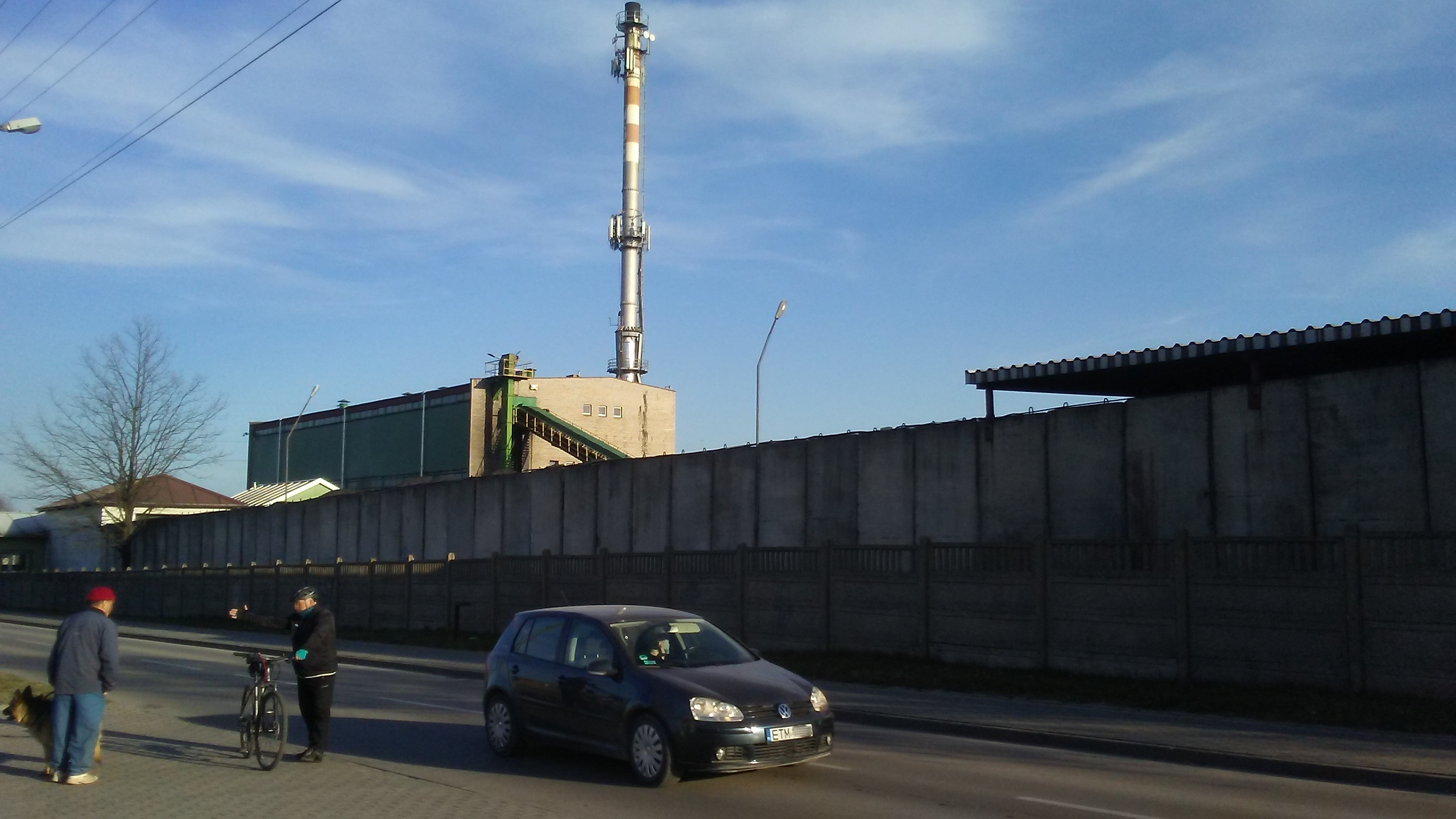 Ciepłownia (ZGC) przy ul. Wierzbowej w Tomaszowie Mazowieckim